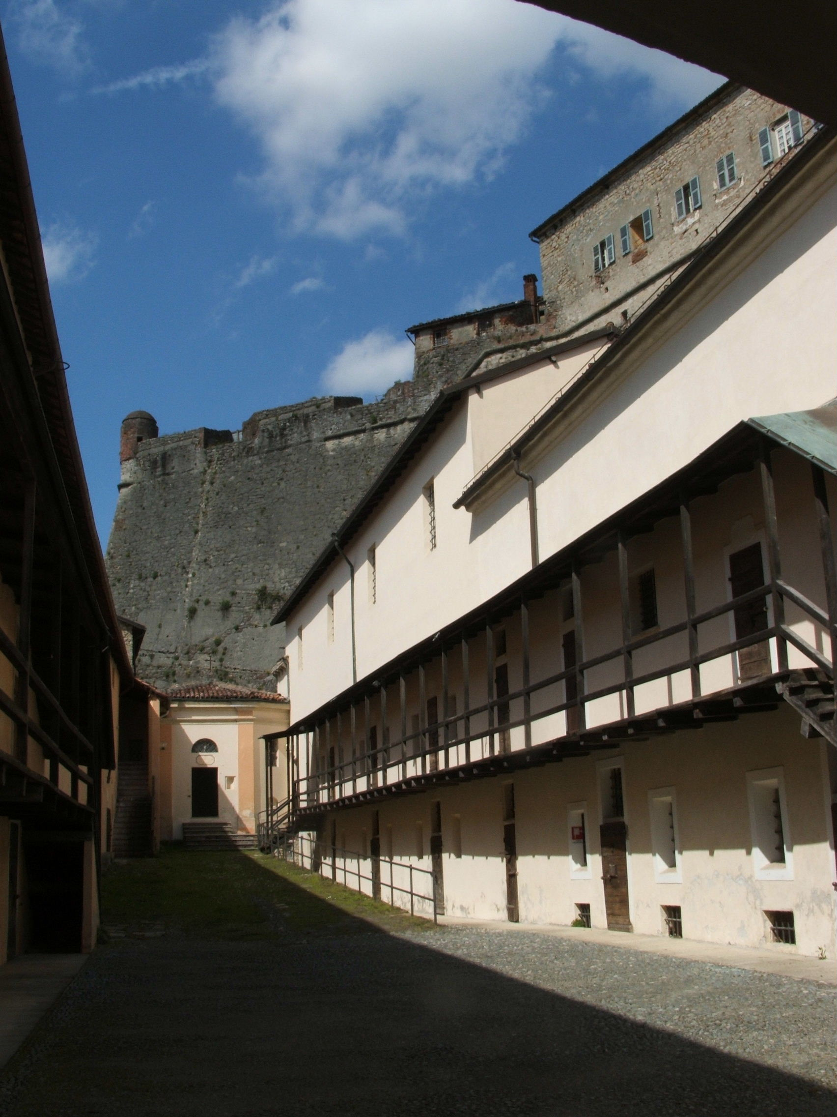 Forte di Gavi, Gavi, Piemonte, Italia